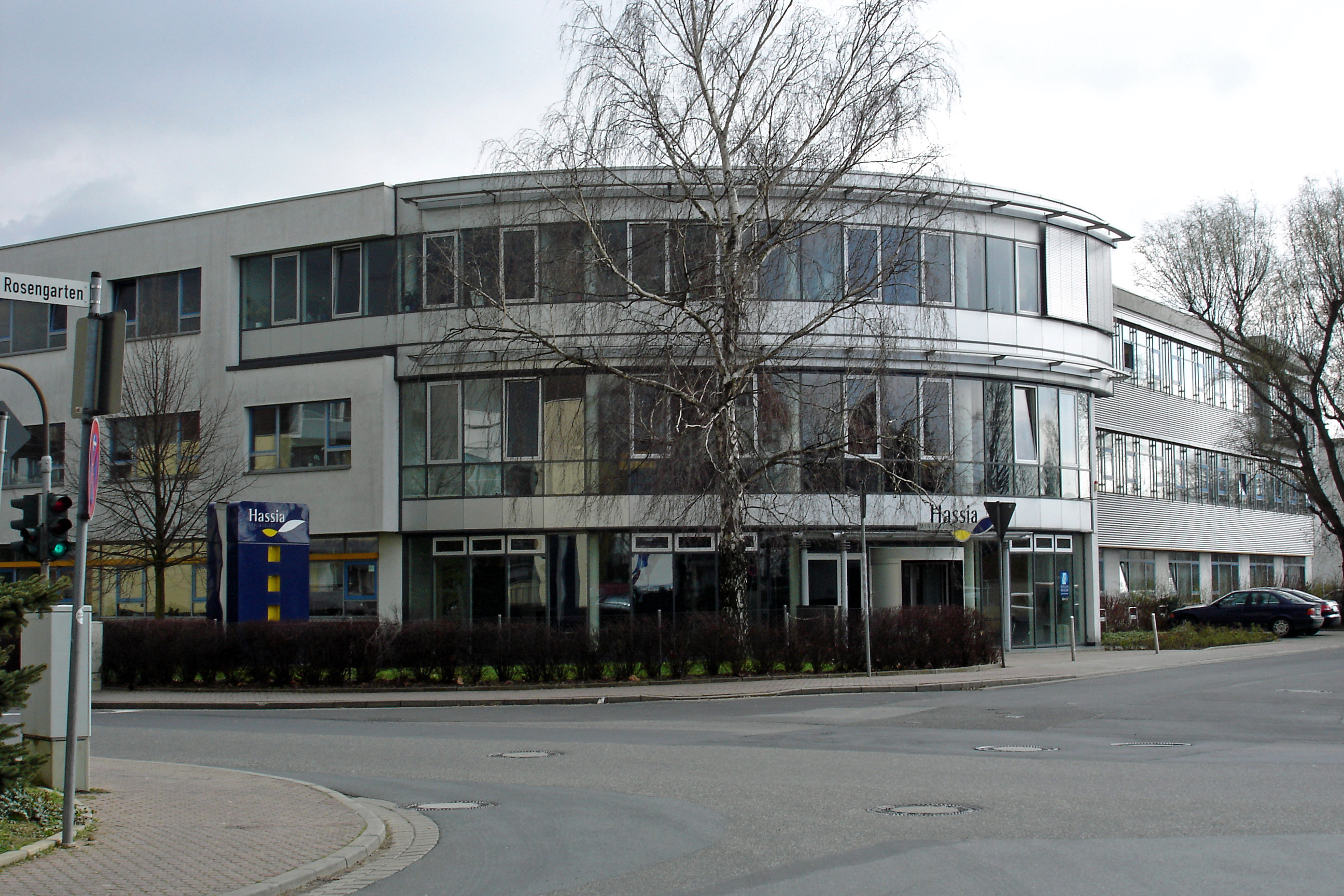 Hassia-Sprudel-Verwaltung in Bad Vilbel